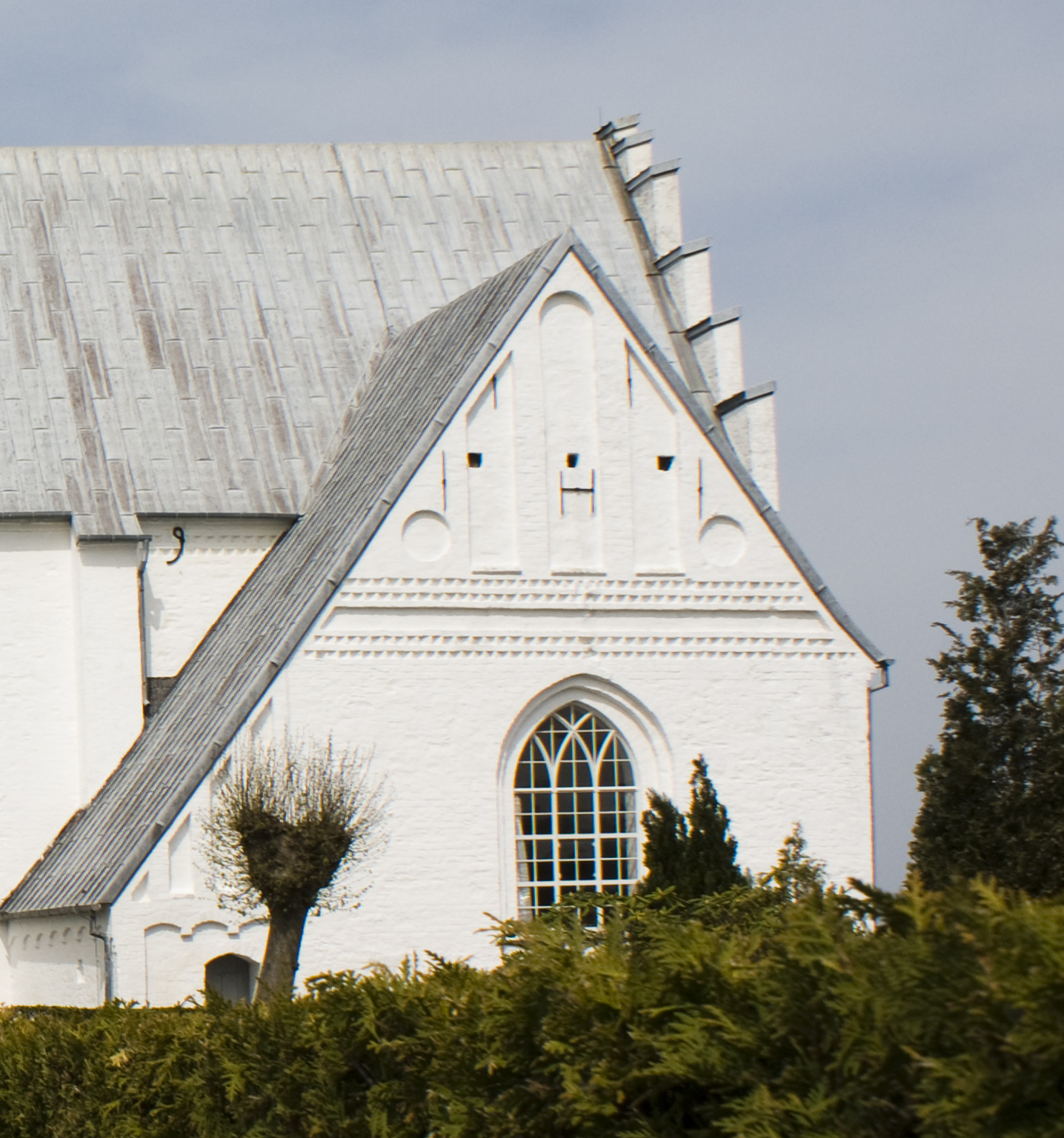 Kapel med benhus, Øsby kirke ved Haderslev i Danmark.